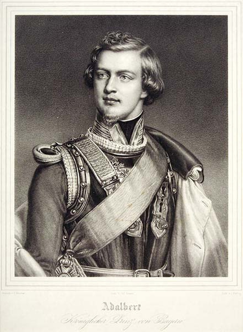 Adalbert Wilhelm von Bayern (1828-1875)